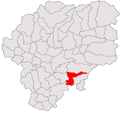 Categorie:Hărţi ale judeţului Bistriţa-Năsăud